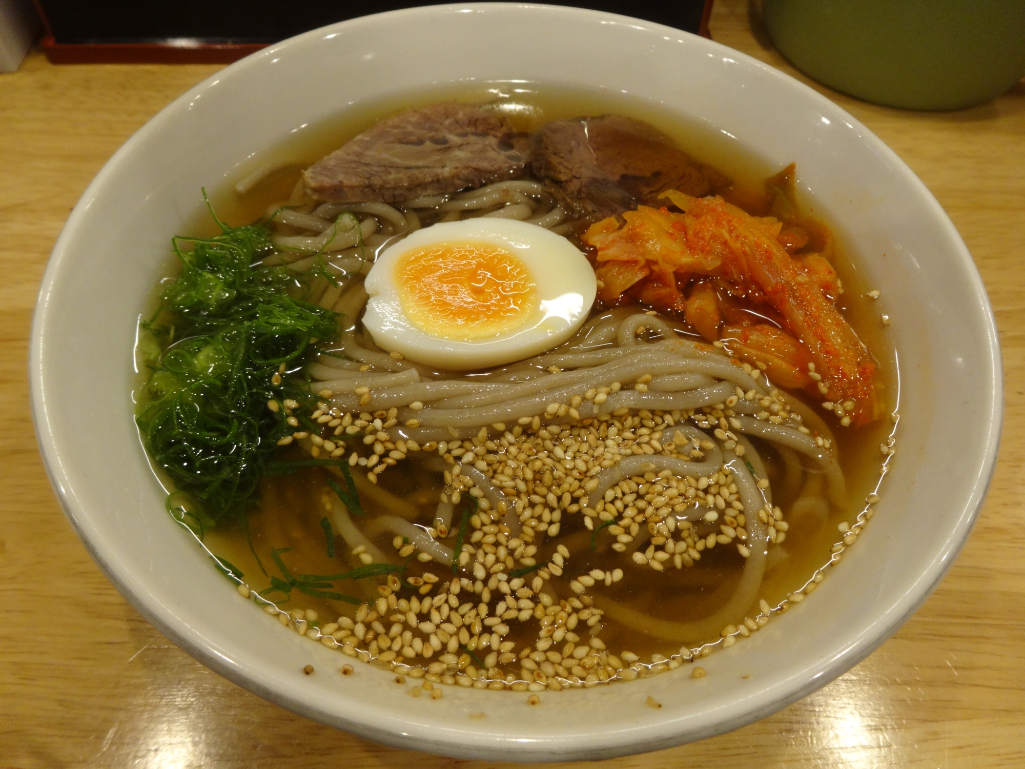 別府冷麺（大分県別府市、手のべ冷麺専門店 六盛より撮影）